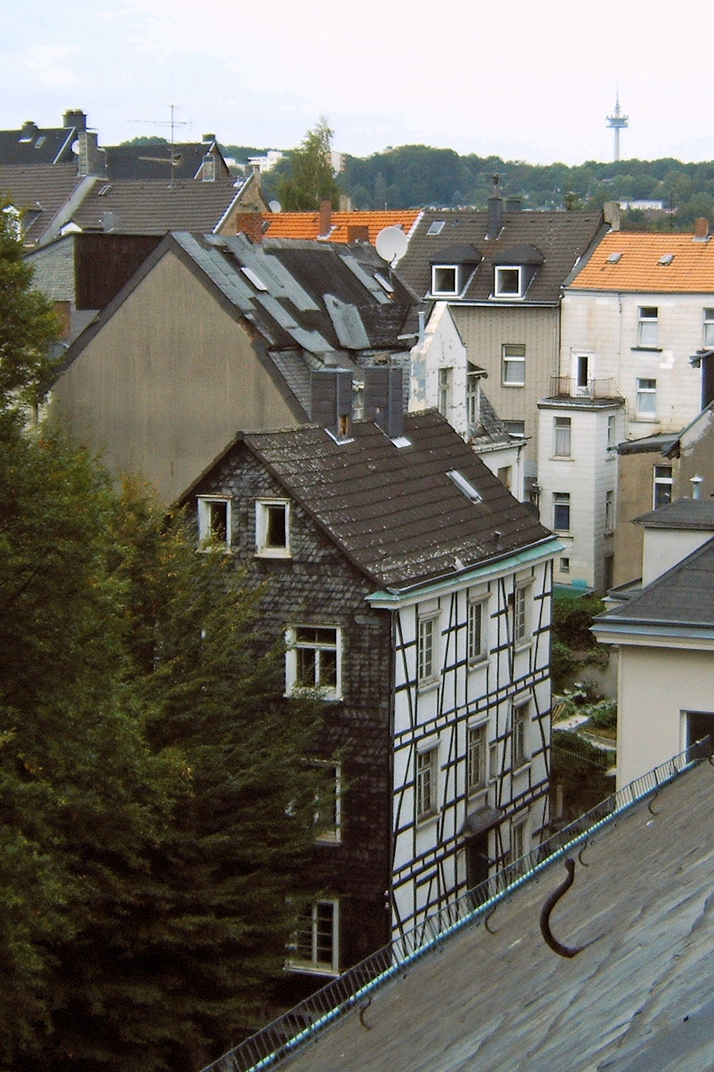 Das Haus "Neue Friedrichstraße 6a" in Wuppertal-Elberfeld am 2006-09-23.